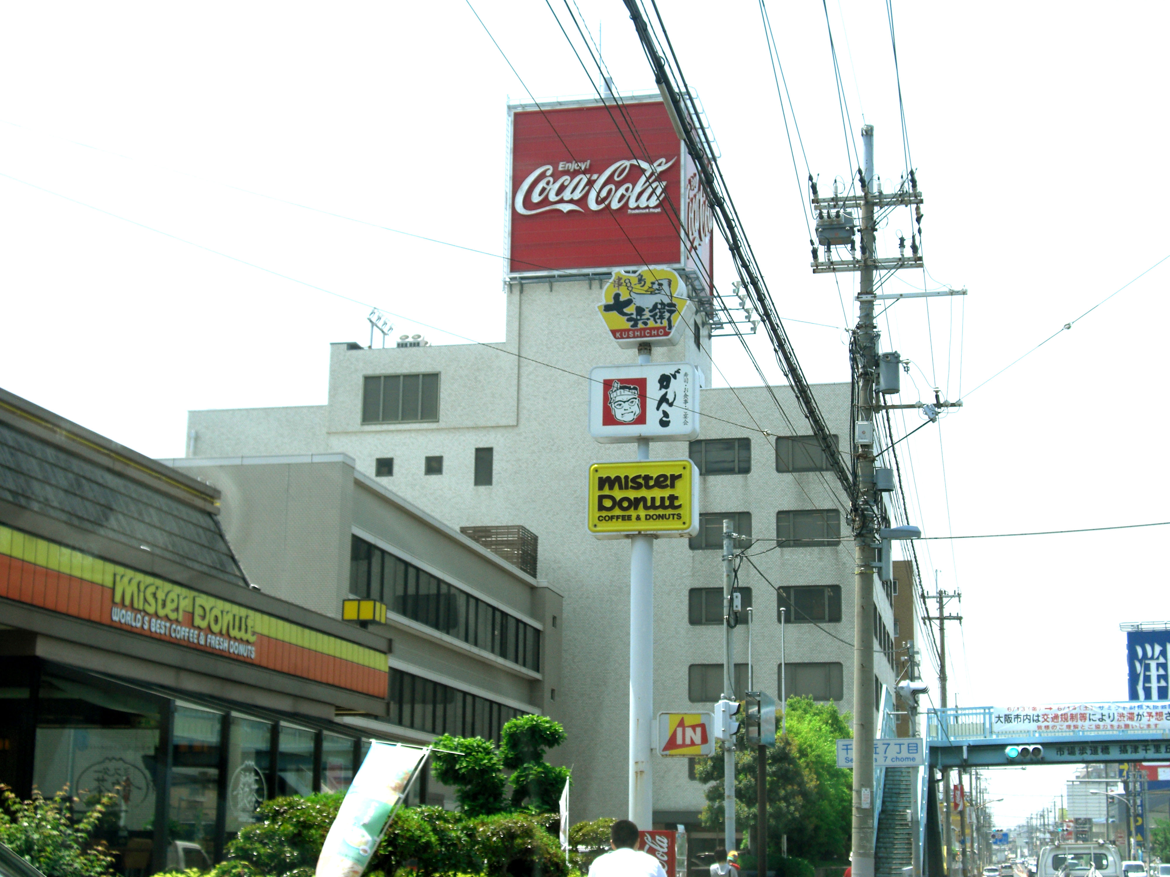 KINKI COCA-COLA BOTTLING,Senrioka Settsu-City Osaka Japan.